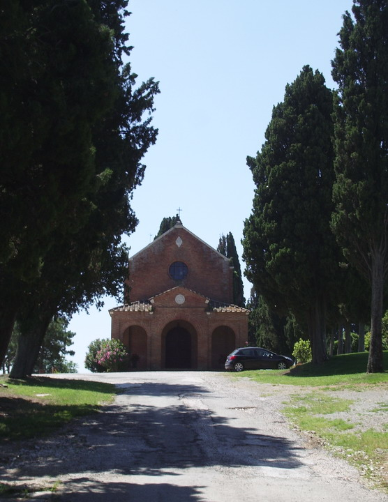 La Cappella di Sant'Antonio Abate presso la tenuta di Montecucco (GR)